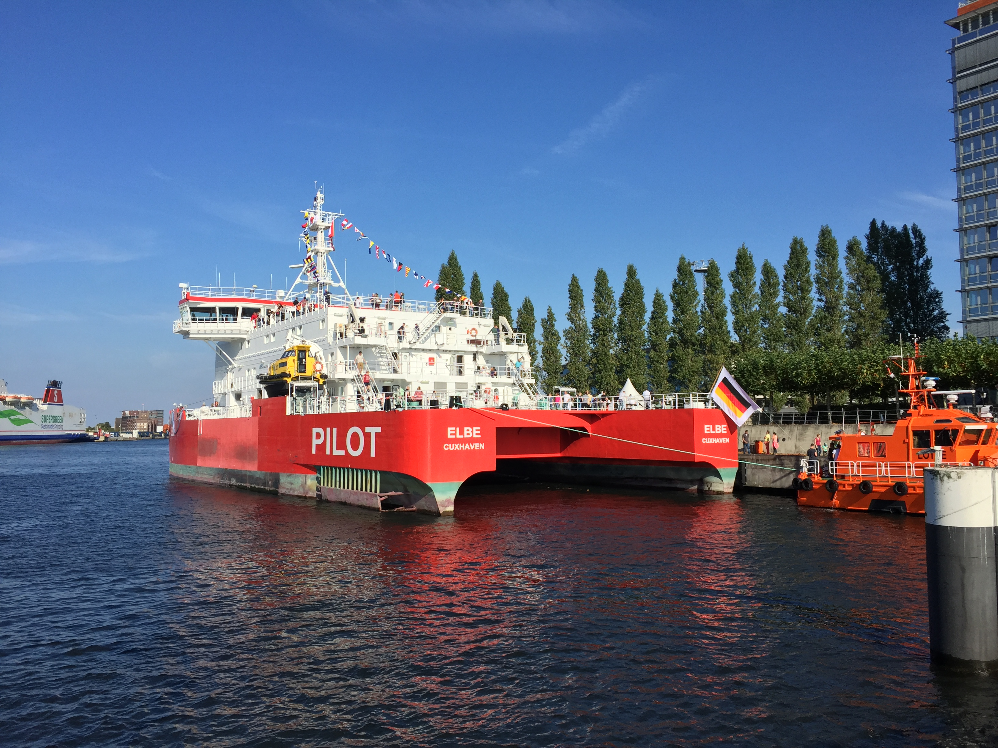 Lotsenstationsschiff Elbe in Kiel (Heckansicht)